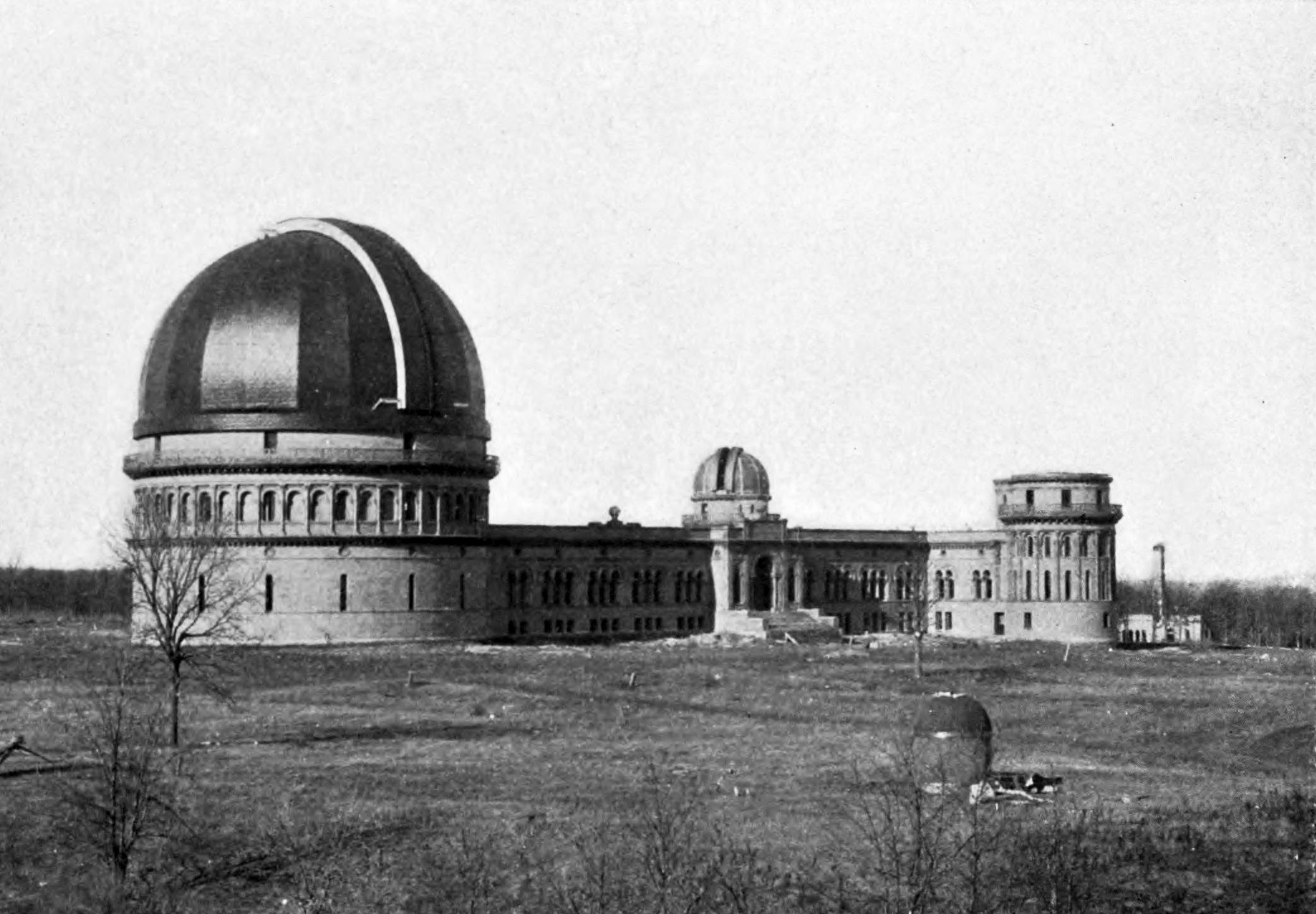 Yerkes Observatory, Lake Geneva.jpg